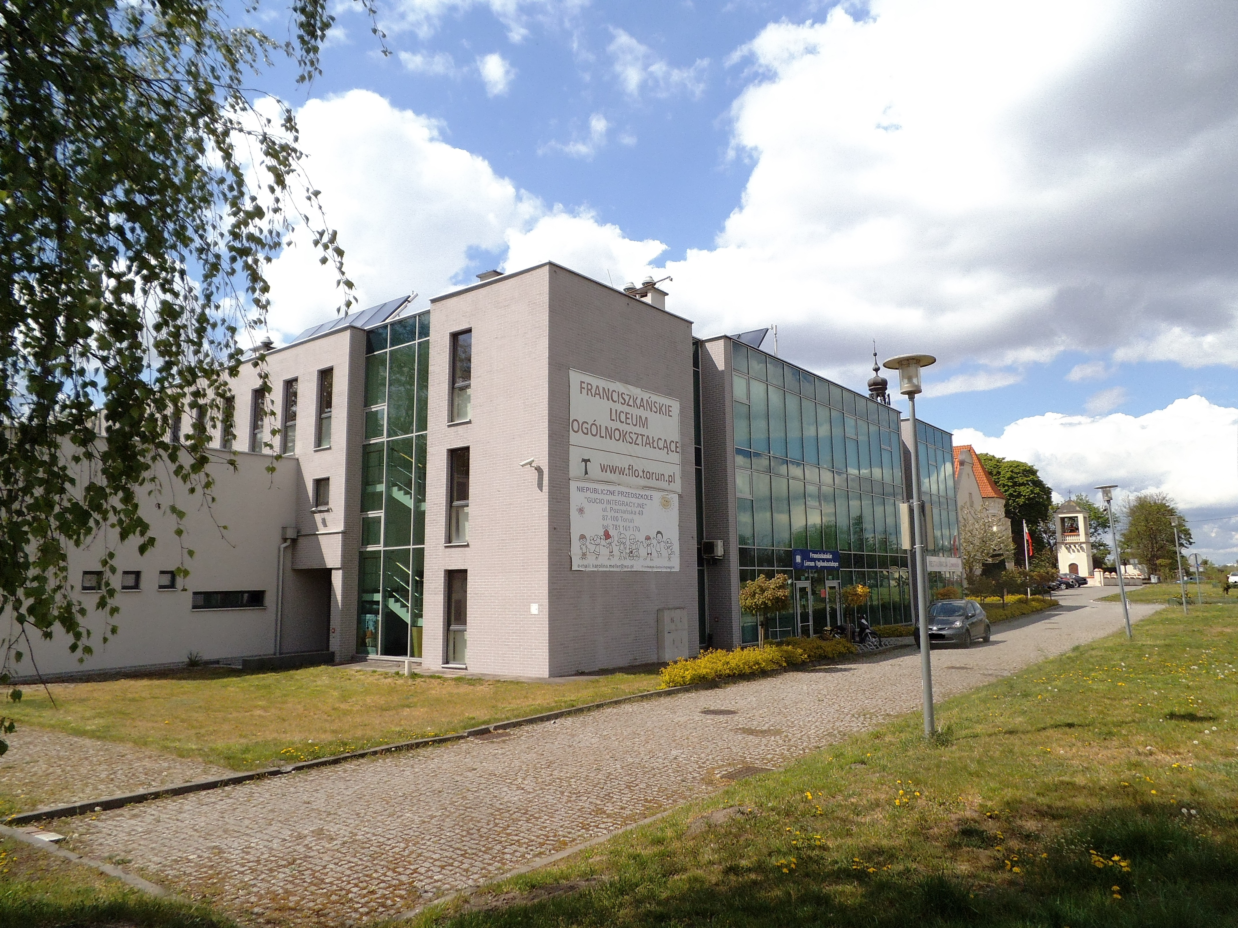 Wyższa Szkoła Filologii Hebrajskiej w Toruniu